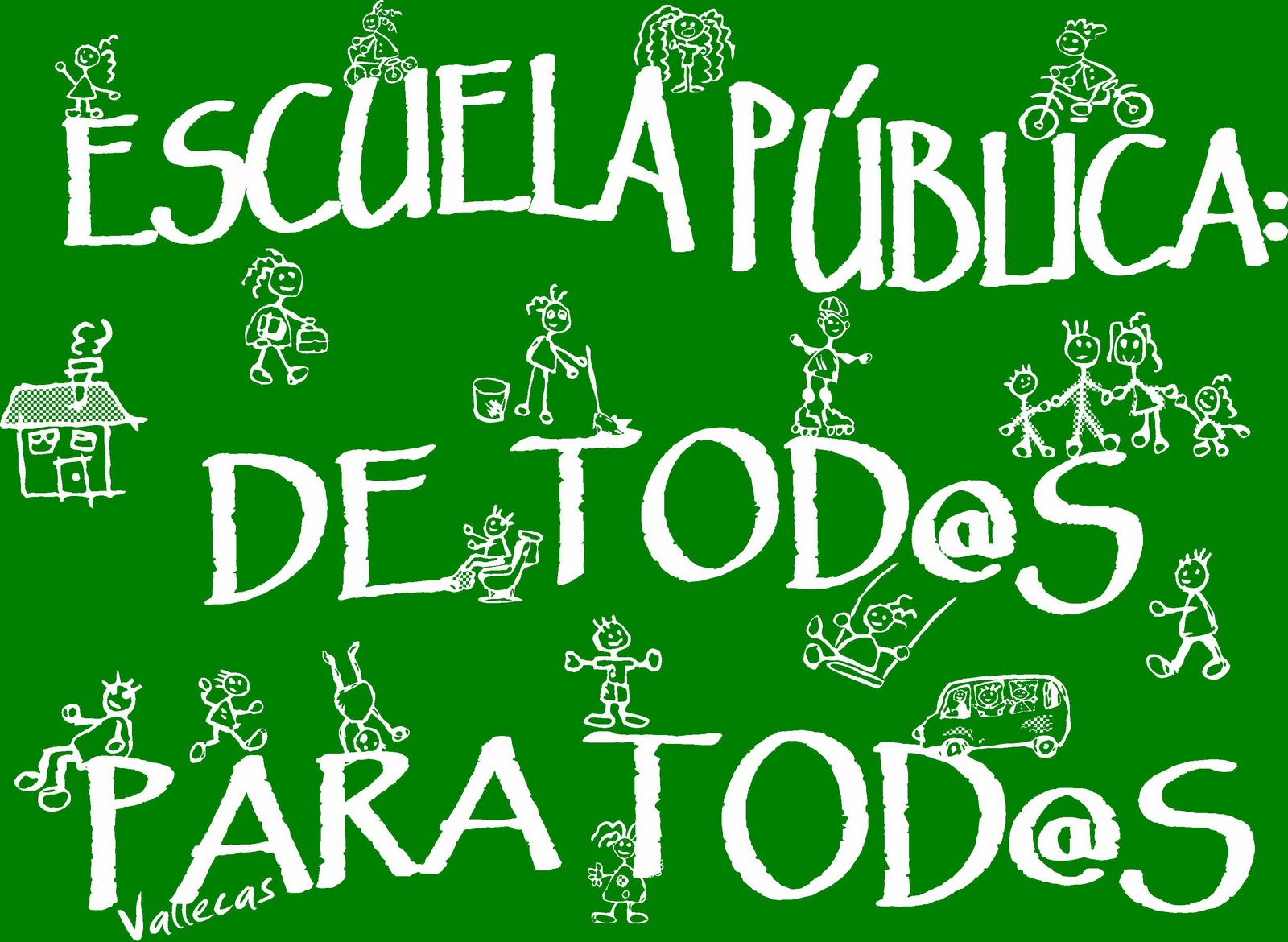 Logotipo de la Marea Verde: Escuela Pública de Todos, para Todos. Icono de las protestas de inicio de curso 2011/2012 en Madrid.